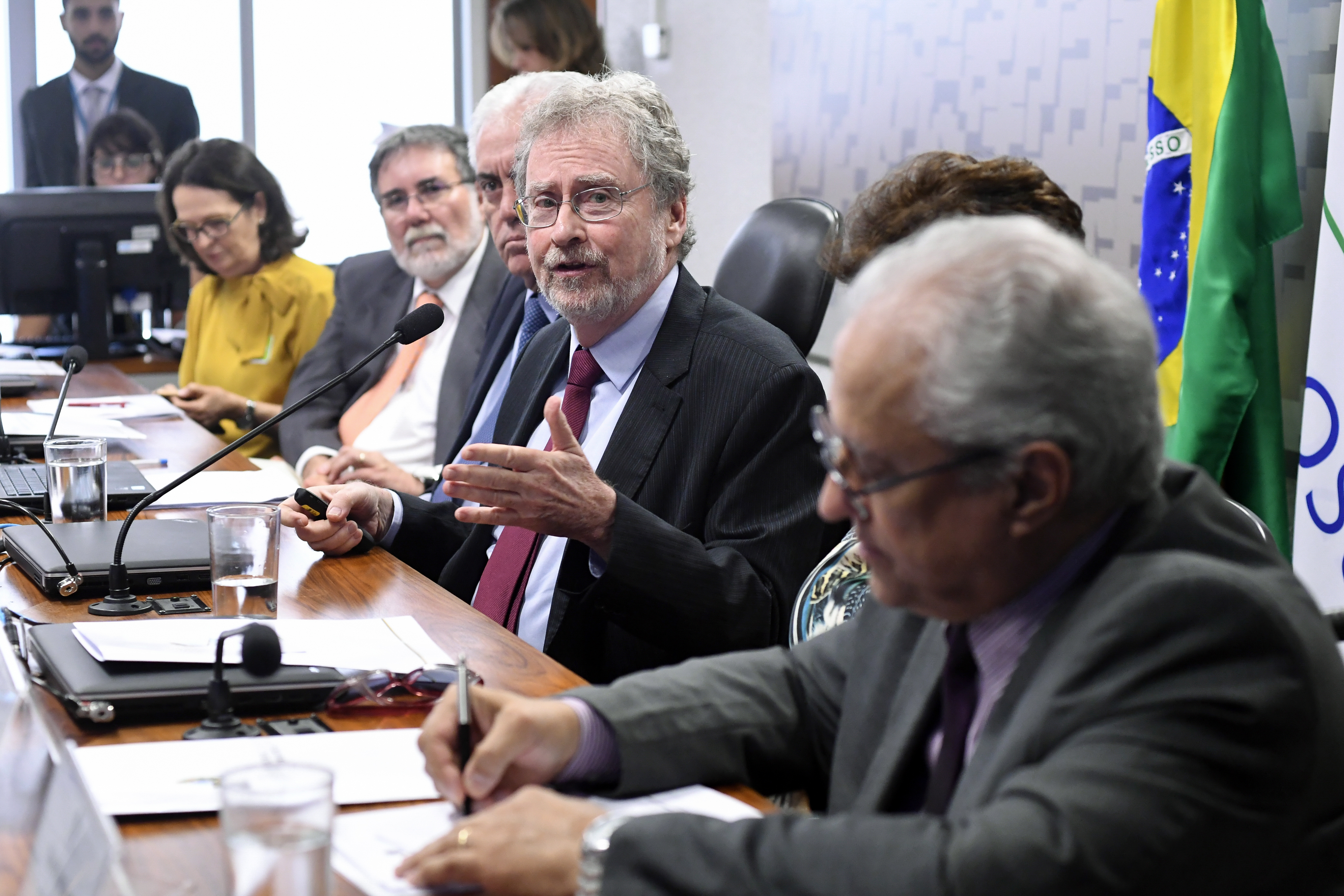 Comissão de Ciência, Tecnologia, Inovação, Comunicação e Informática (CCT) realiza audiência pública interativa para debater o tema "A Finep como Secretaria Executiva e Agência Executora do FNDCT, de forma a levantar os impactos positivos já alcançados e identificar as principais dificuldades enfrentadas". Mesa: presidente do Conselho Nacional das Fundações Estaduais de Amparo à Pesquisa (Confap), Maria Zaira Turchi; diretor-presidente do Conselho Técnico-Administrativo da Fundação de Amparo à Pesquisa do Estado de São Paulo (Fapesp), Carlos Américo Pacheco; presidente da Financiadora de Estudos e Projetos (Finep), Marcos Cintra Cavalcanti de Albuquerque; presidente da CCT, senador Otto Alencar (PSD-BA); presidente da Academia Brasileira de Ciências (ABC), Luiz Davidovich; conselheira da Sociedade Brasileira para o Progresso da Ciência (SBPC), Fernanda Antonia da Fonseca Sobral; presidente do Conselho Nacional de Desenvolvimento Científico e Tecnológico (CNPq), Mario Neto Borges. Foto: Waldemir Barreto/Agência Senado